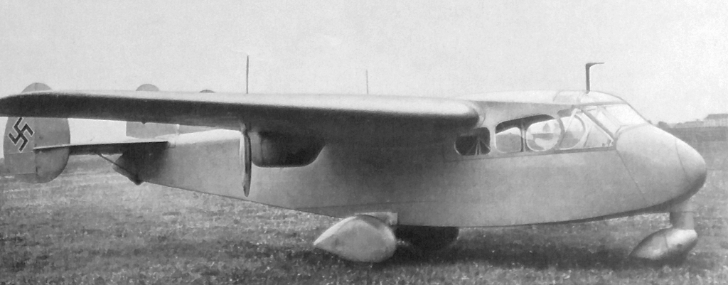 motor Walter Minor 4 (2x) a letoun Praga E-210 již s výsostnými znaky Německa (1939)